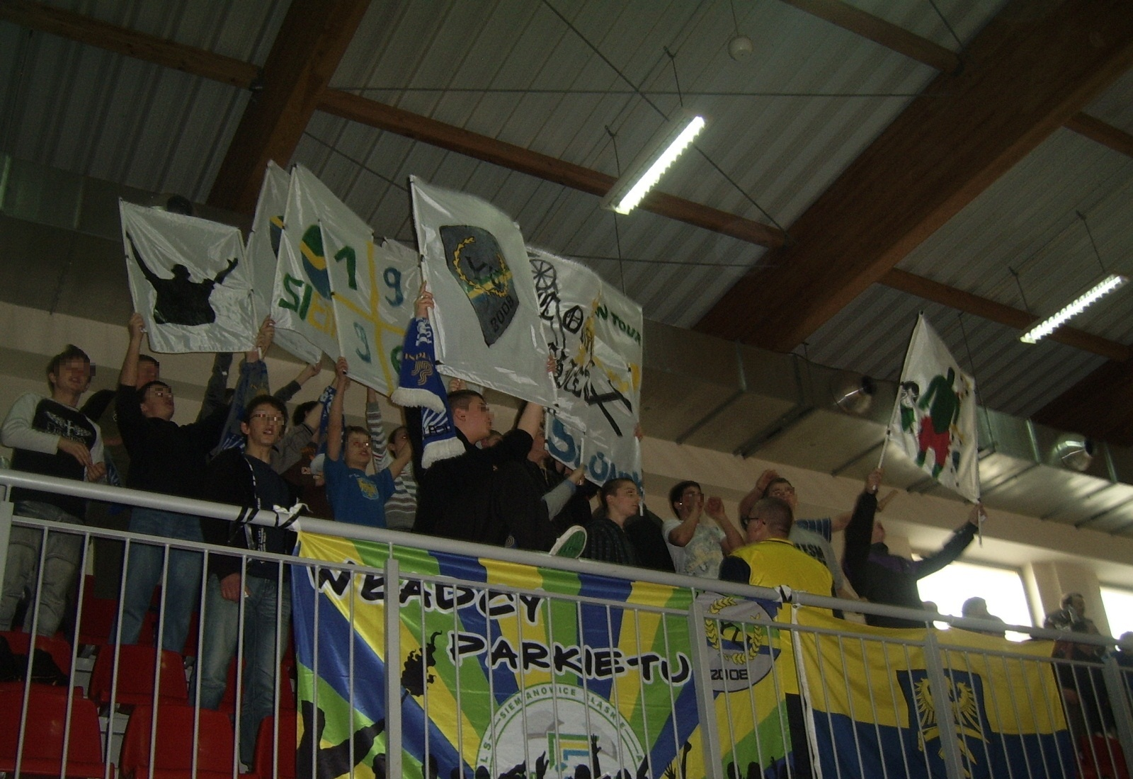 Inpuls-Alpol Siemianowice Śląskie - kibice w Pyskowicach